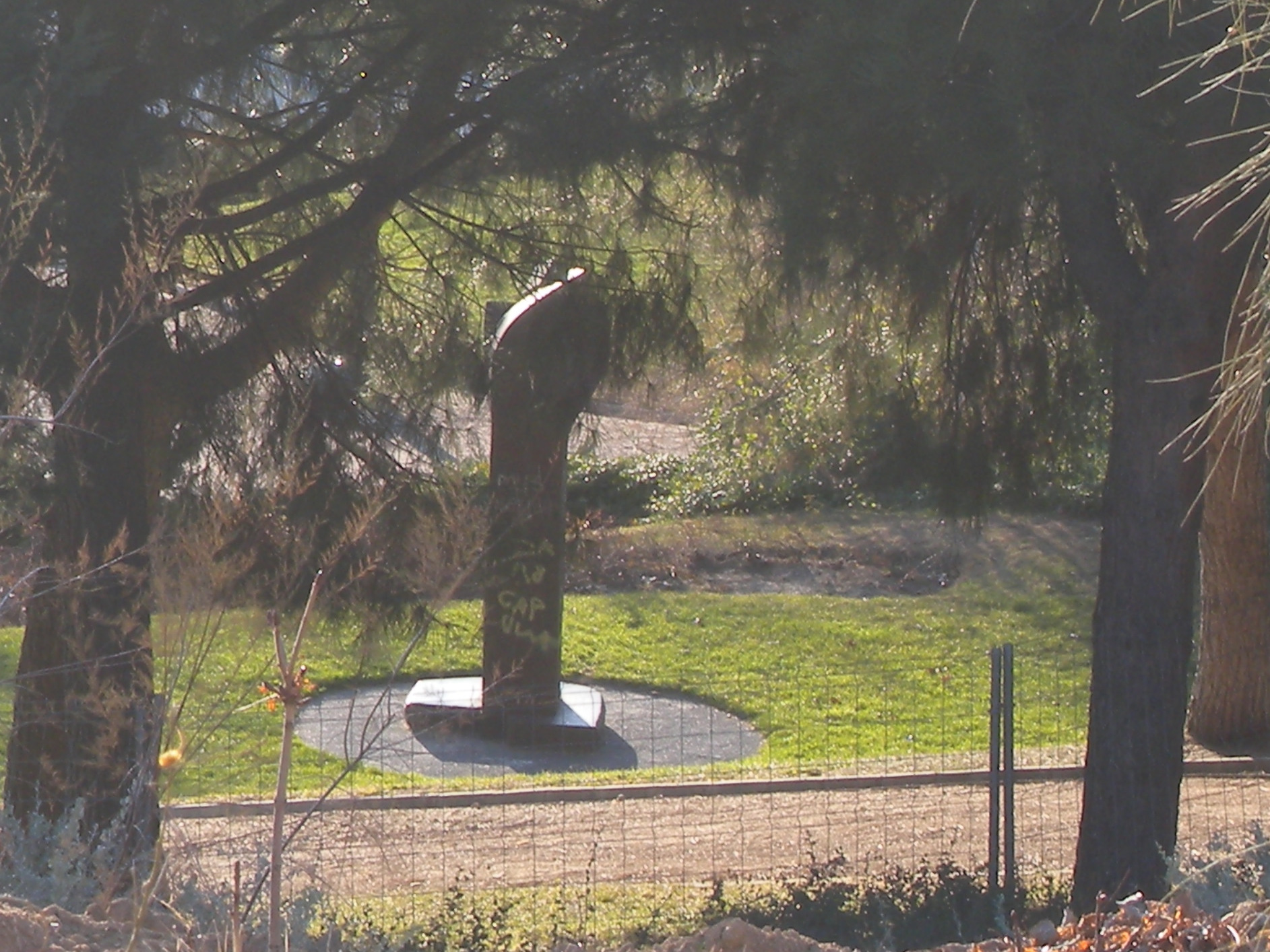 Estela funeraria realizada por Eduardo Chillida dedidada a Agustín Rodríguez Sahagún